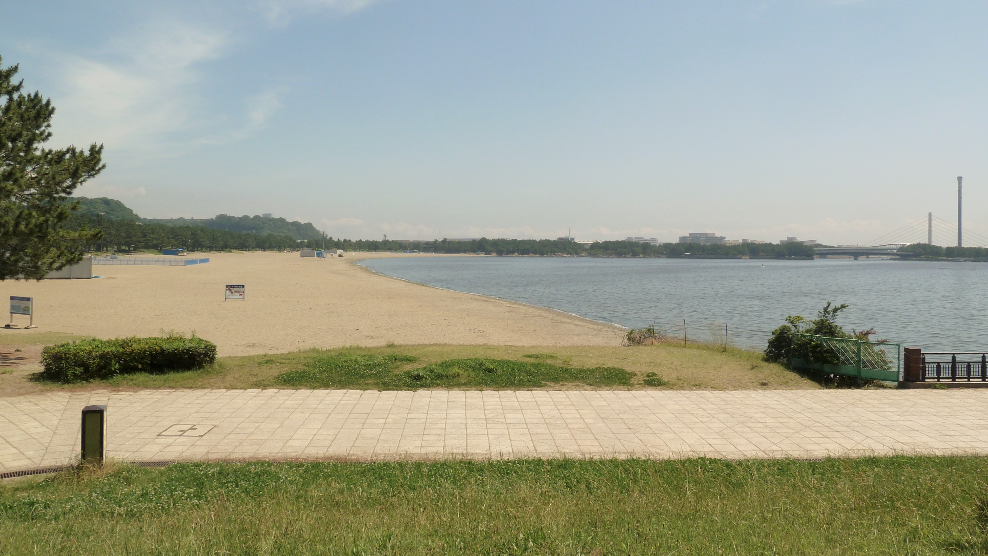 海の公園の砂浜(神奈川県横浜市金沢区)